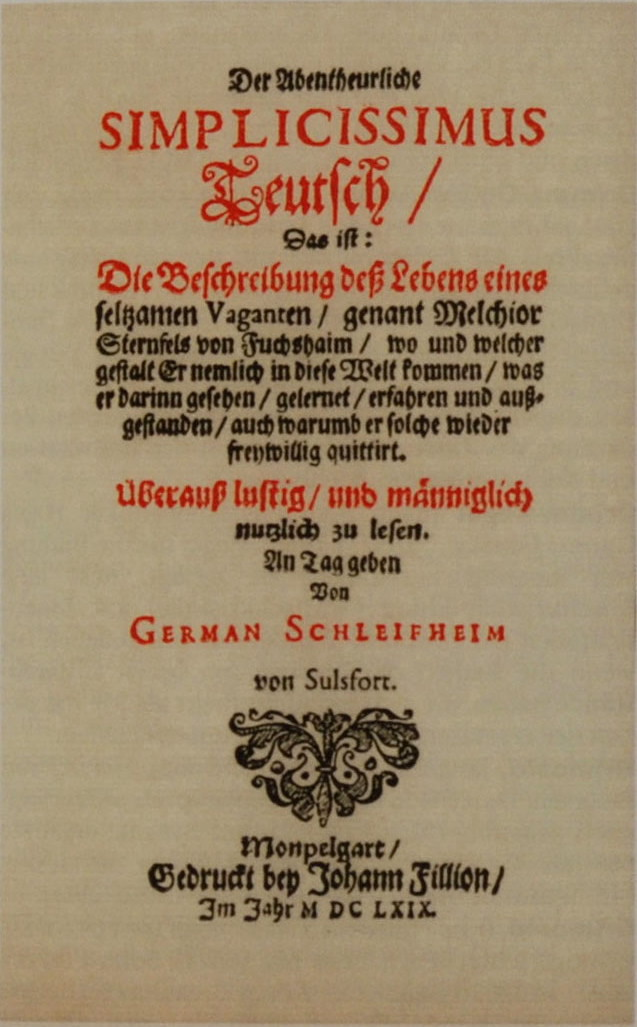 Johann Jakob Christoffel von Grimmelshausen: Titelblatt der Erstausgabe des Romans "Der Abentheuerliche Simplicissimus Teutsch"